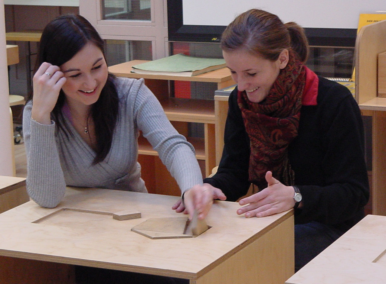 Studentinnen an einem Spieltisch im "Haus der Mathematik"